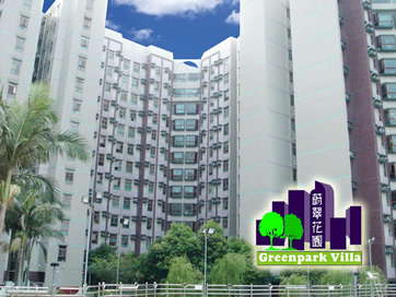 蔚翠花園logal